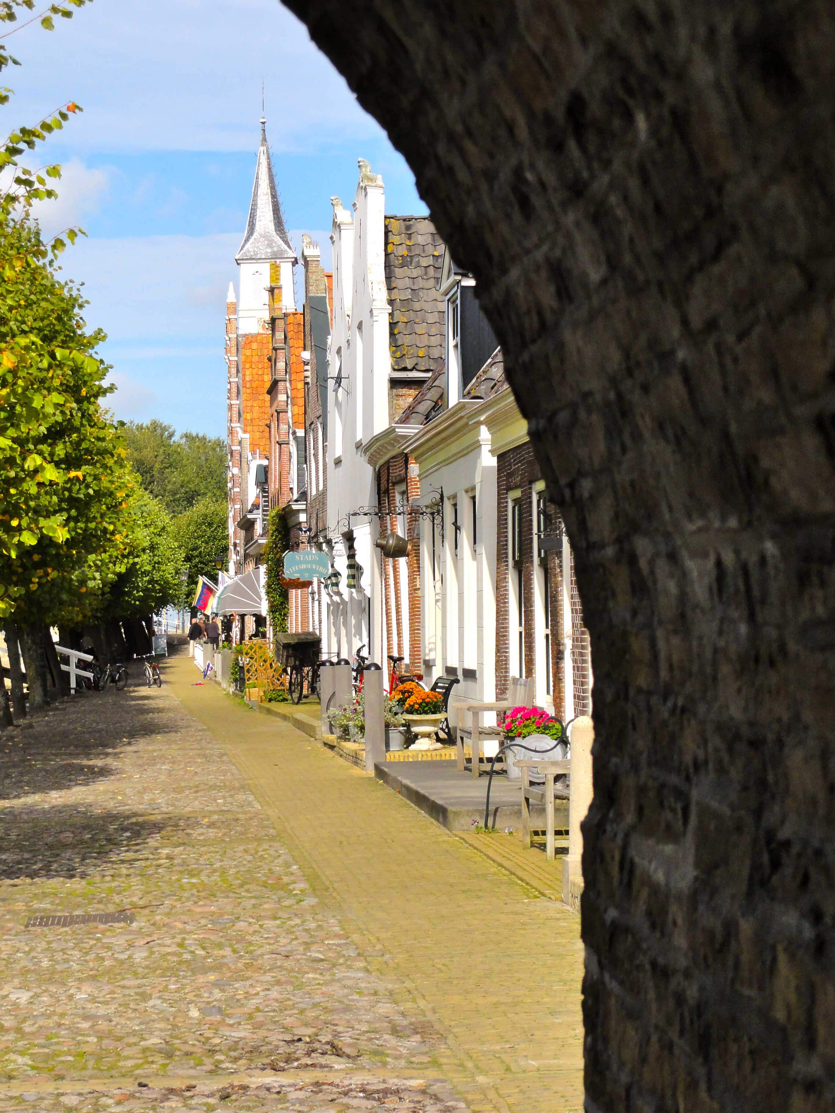 Sloten vanuit de Lemsterwaterpoort